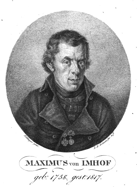 Maximus von Imhof (1758-1817), geadelter bayerischer Priester und Naturwissenschaftler